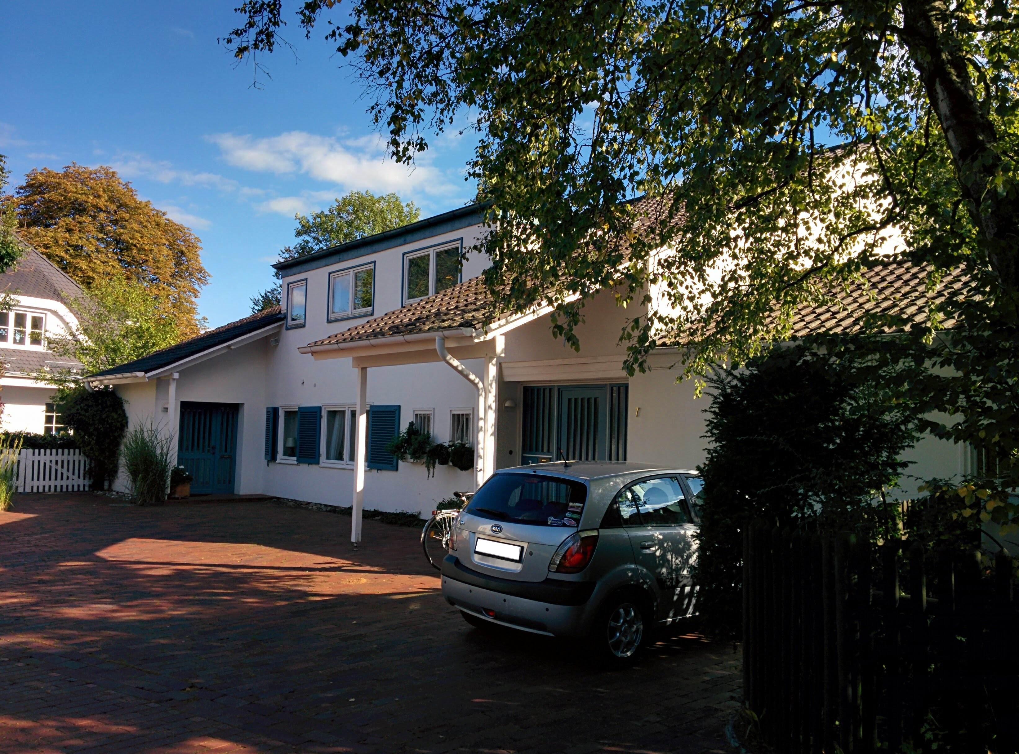 Das Haus An der Trift 7 in Hannover